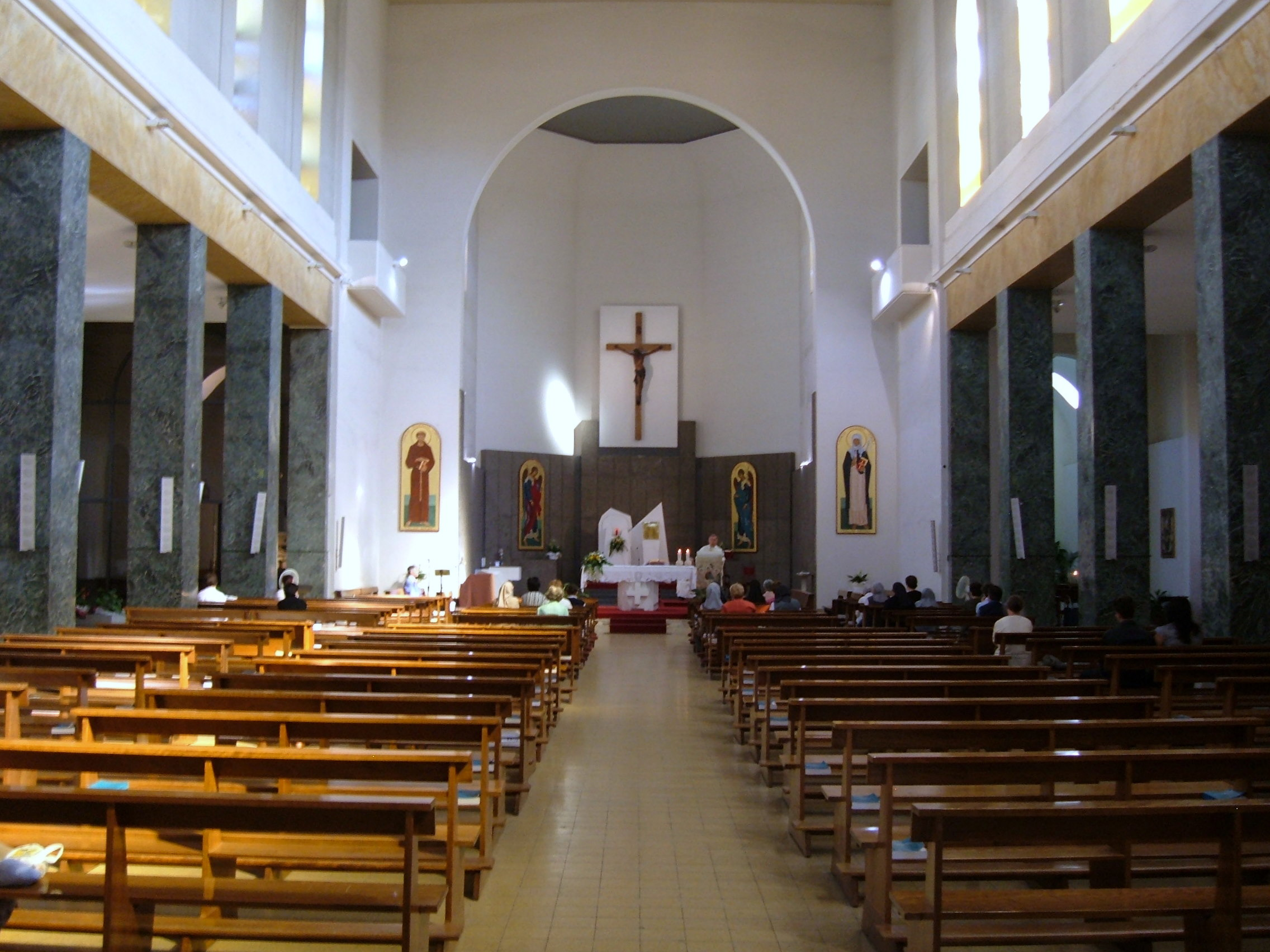 Chiesa di San Francesco d'Assisi e Santa Caterina da Siena, Patroni d'Italia, a Roma, nel quartiere Gianicolense.